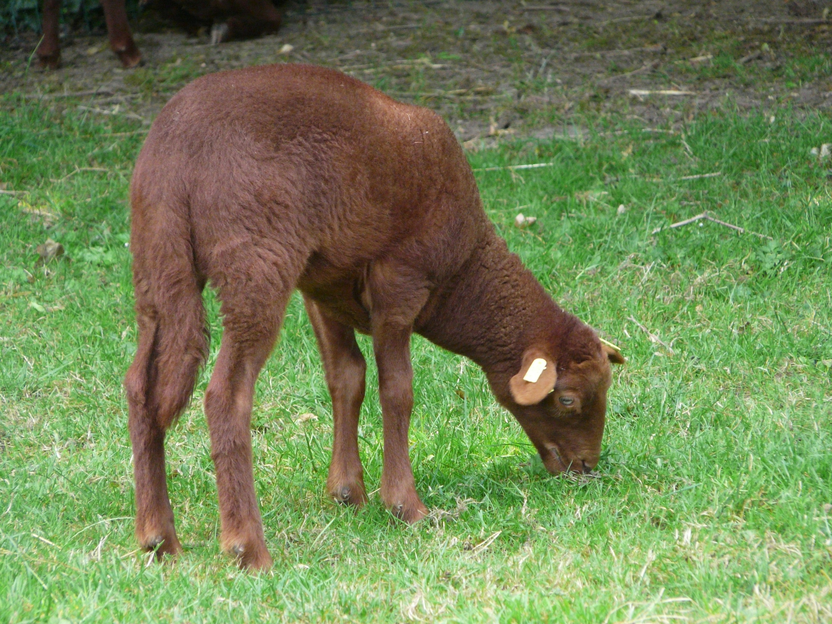 Agneau solognot, Grand parc du Puy du Fou, Vendée, France